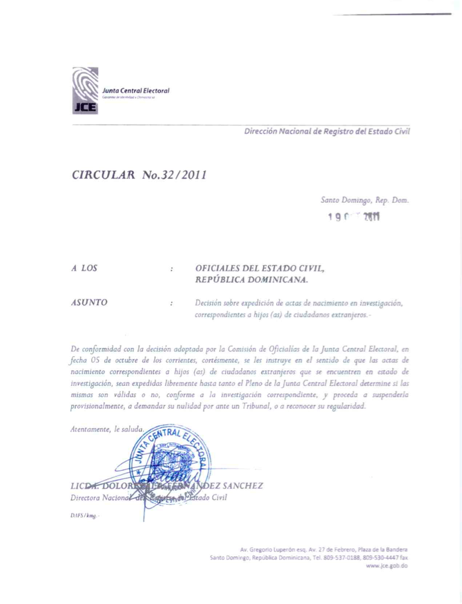 Circular 32 de la Junta C entral Electoral